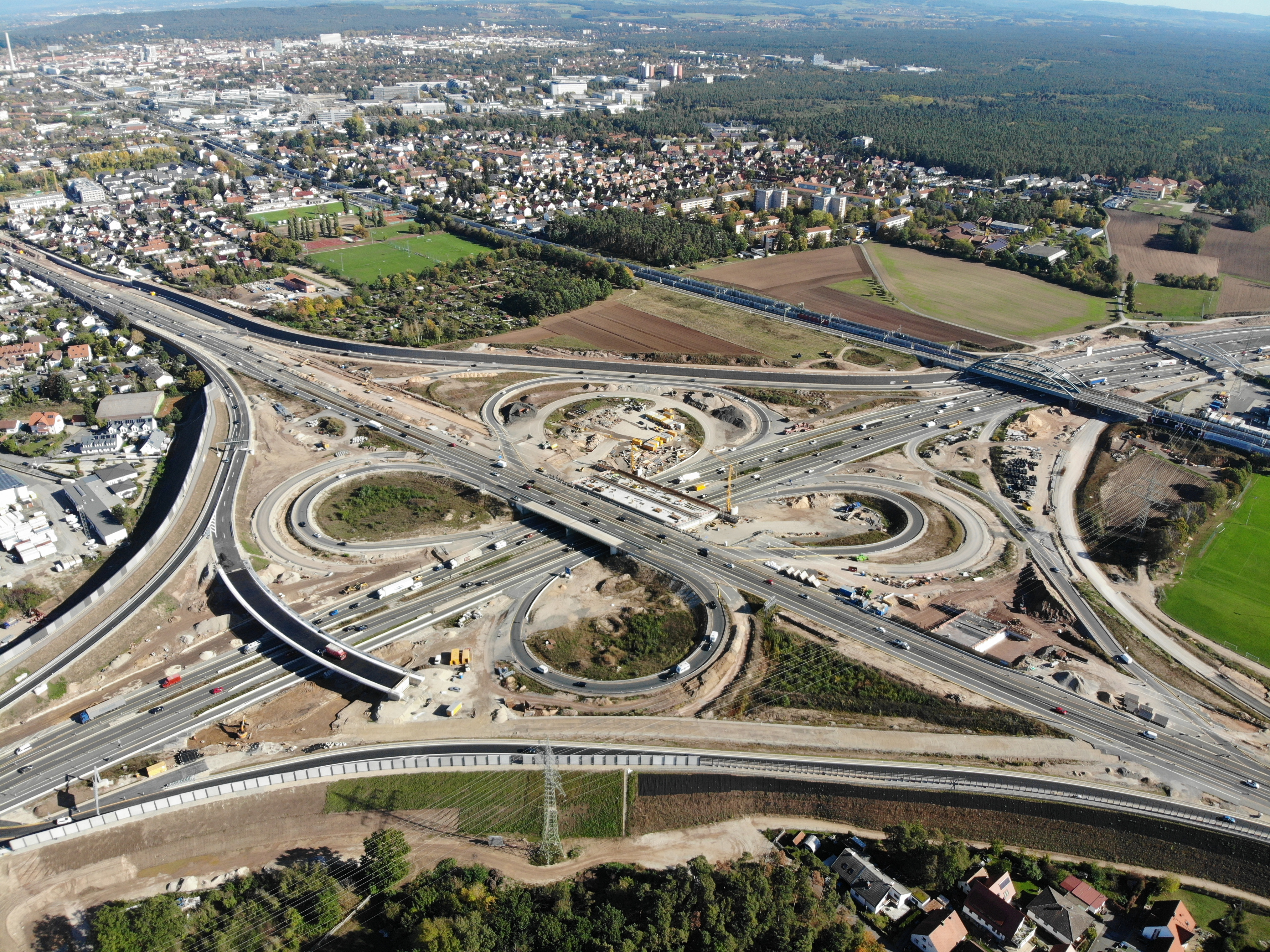 Autobahnkreuz Fürth-Erlangen Luftaufnahme (2019)